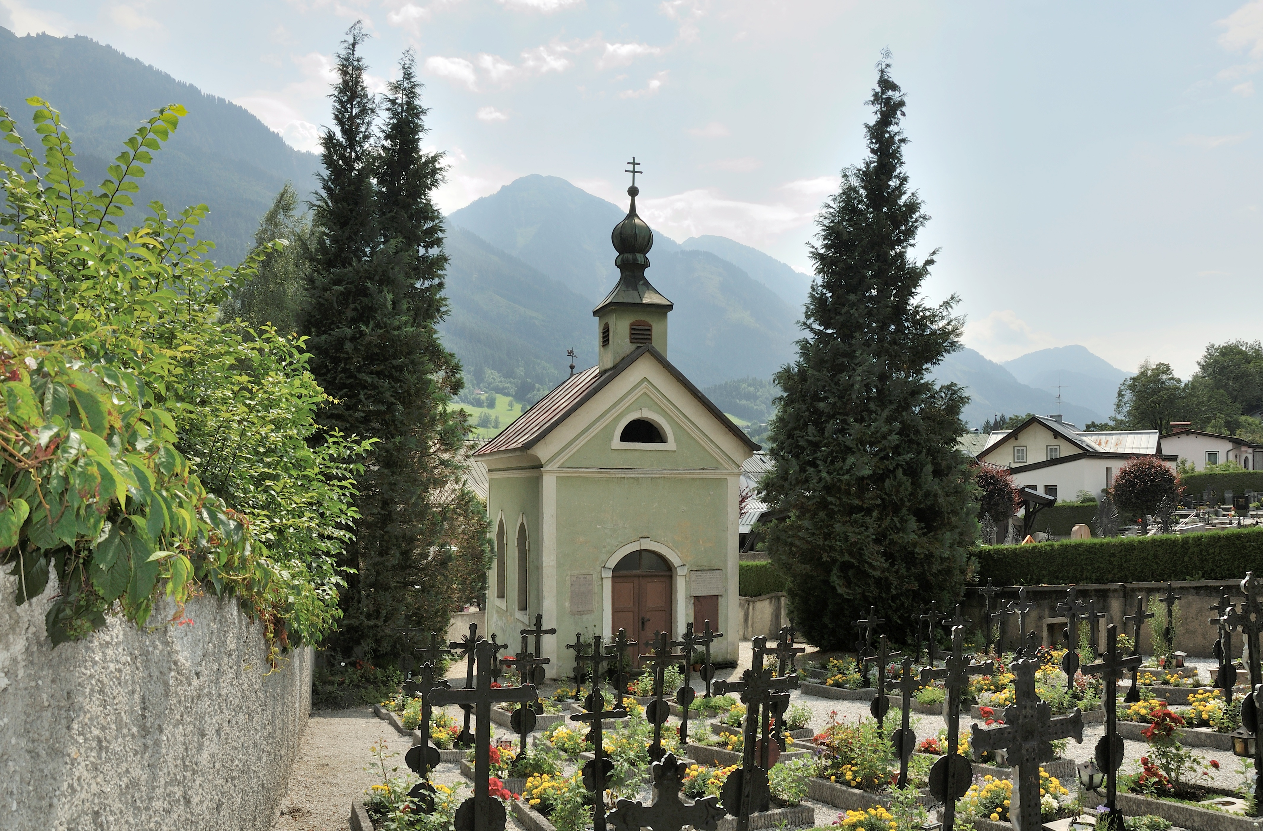 Friedhofskapelle und -mauer